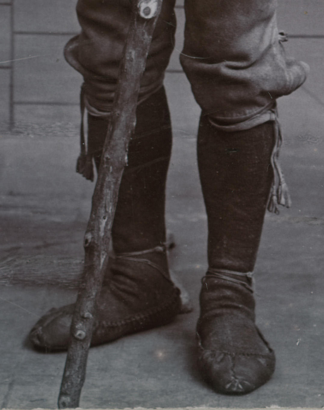 Kose kihelkonna mehe pastlad